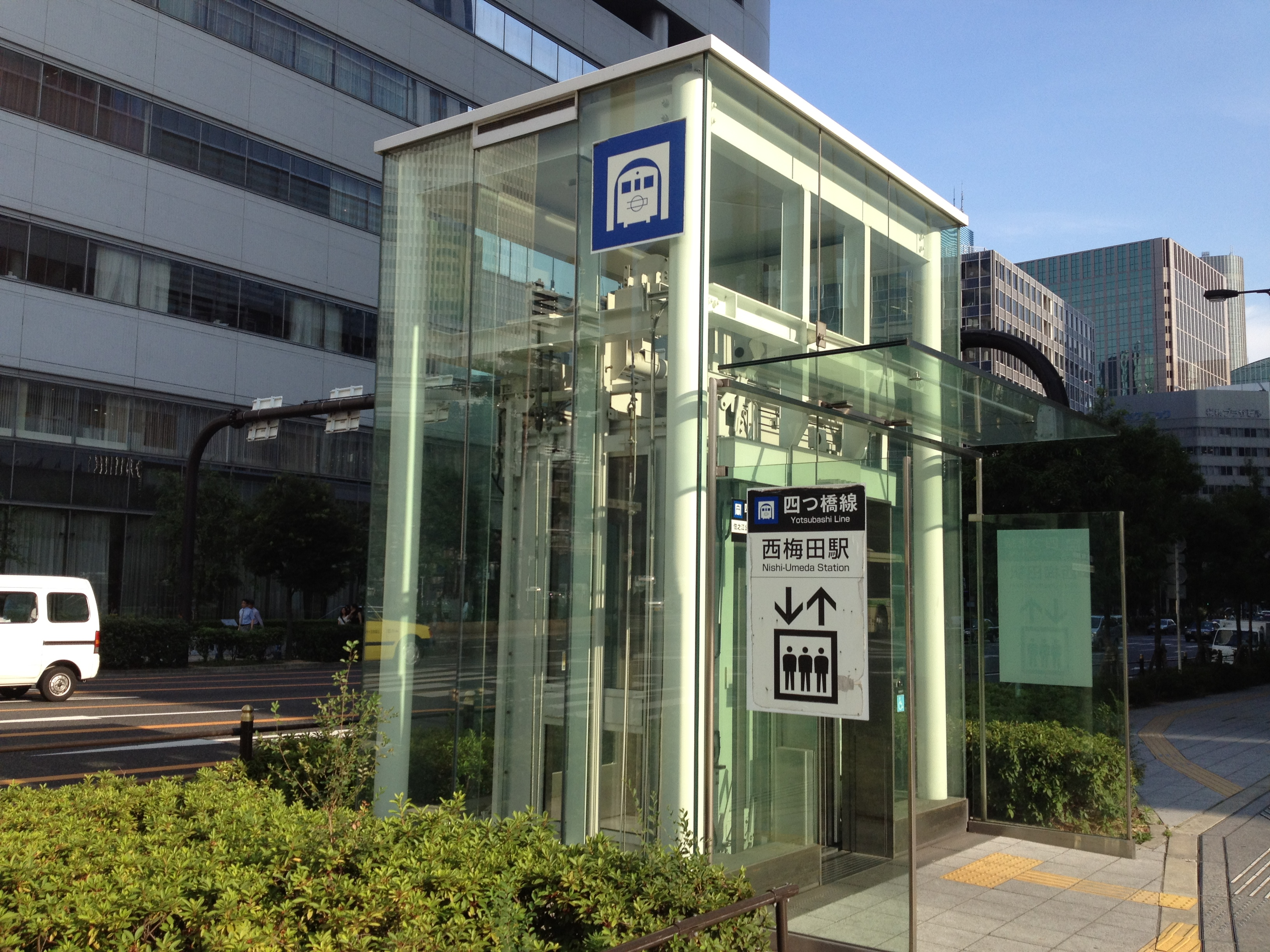 西梅田駅出入口